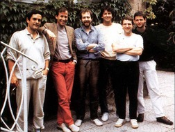 Grupo alemán de Música New Age